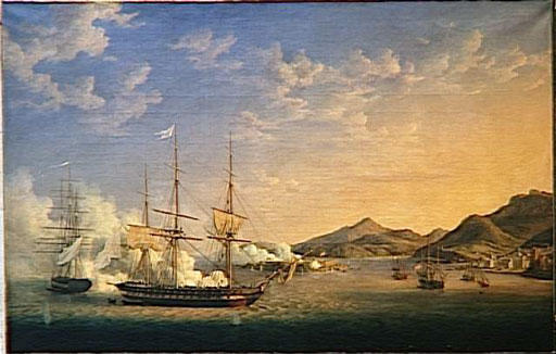 Attaque et prise du fort de l'Île Verte (par Pierre-Julien Gilbert ([1783-1860], musée national des châteaux de Versailles et de Trianon)